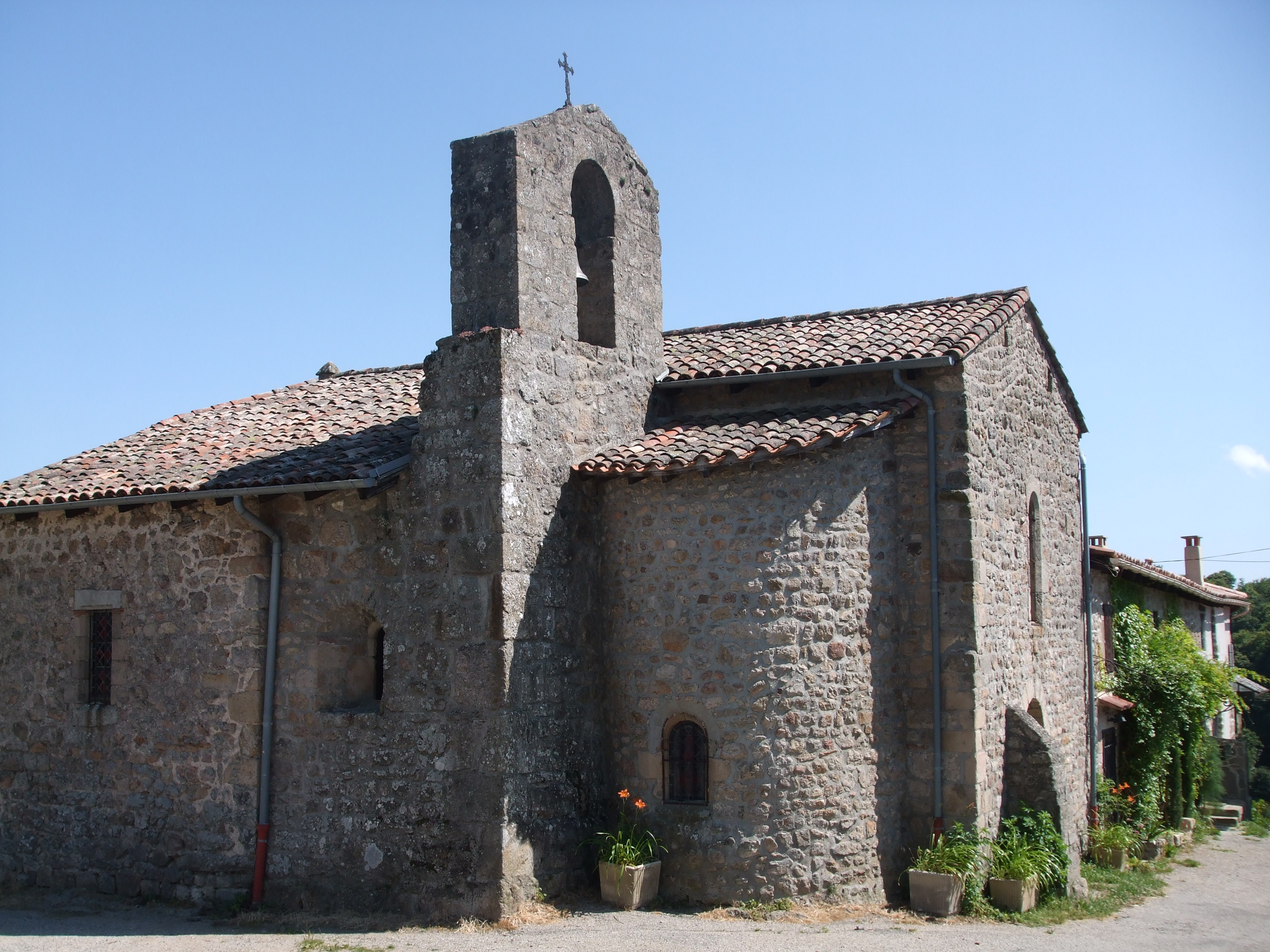 église Saint Apollinaire